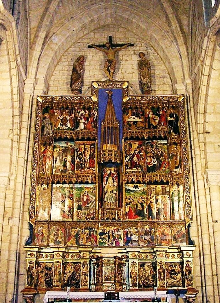 Santa María la Blanca, Villalcázar de Sirga, Palencia